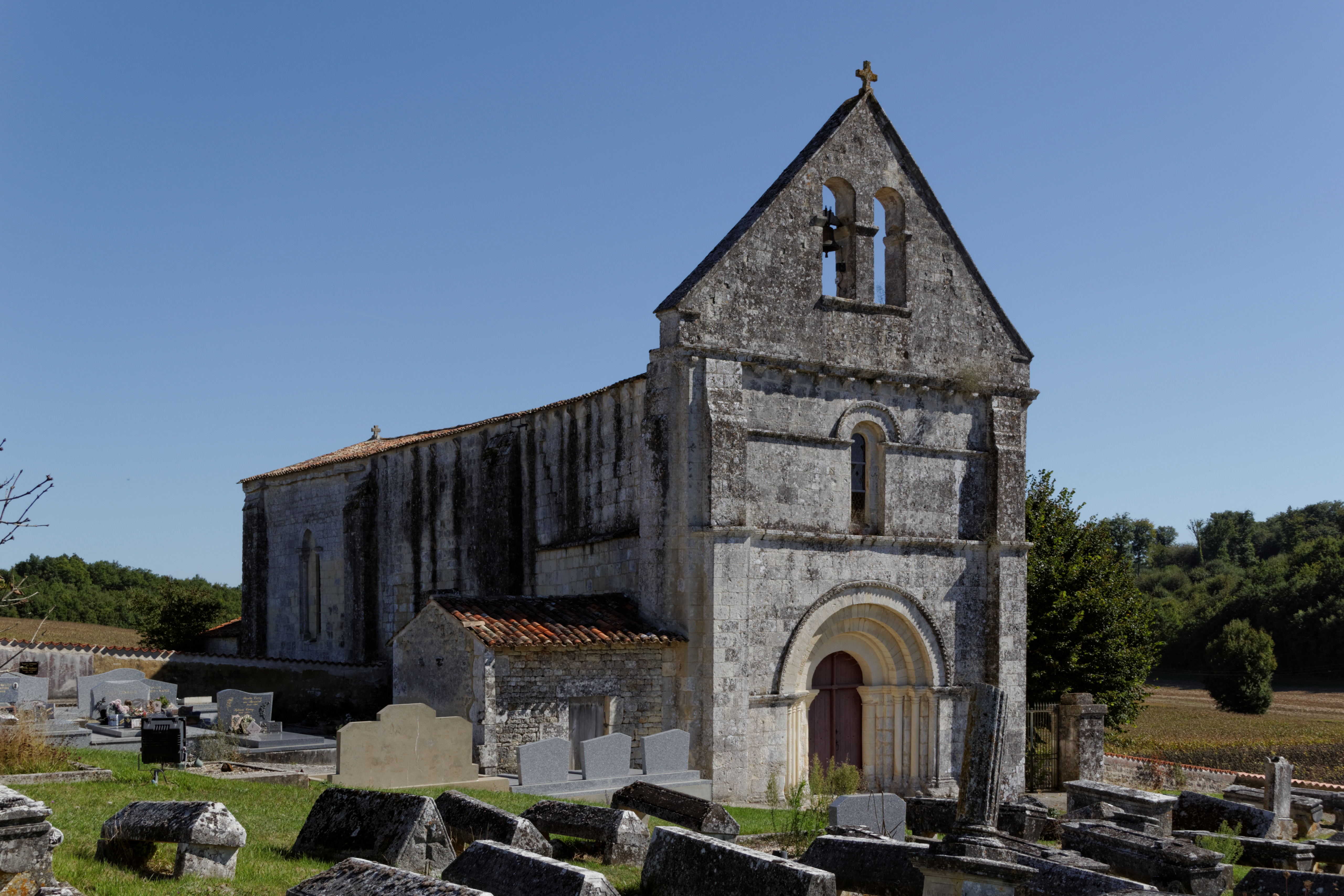 Église Saint-Pierre de Juicq (Inscrit) .